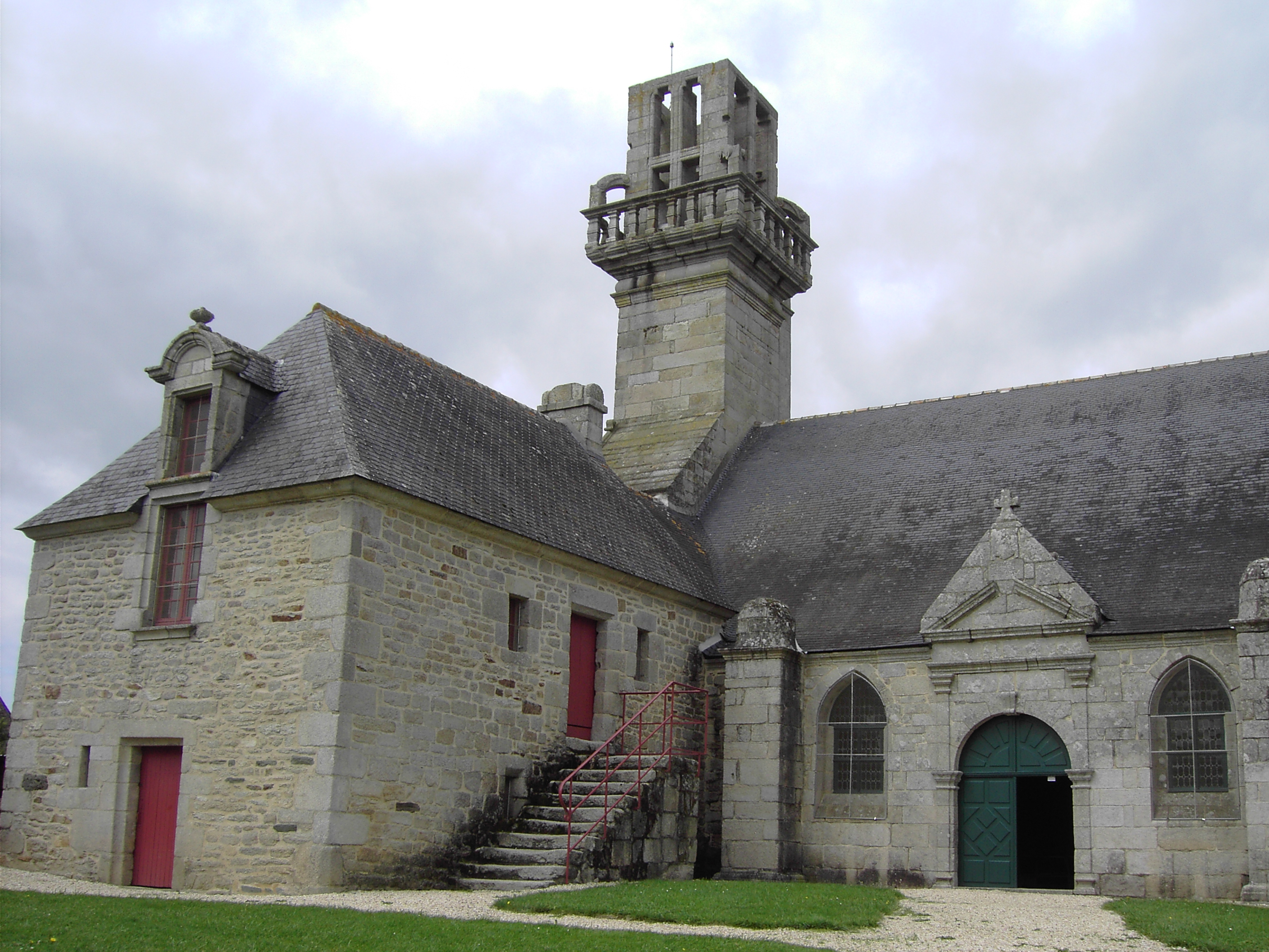 chapelle de languivoa (209) france